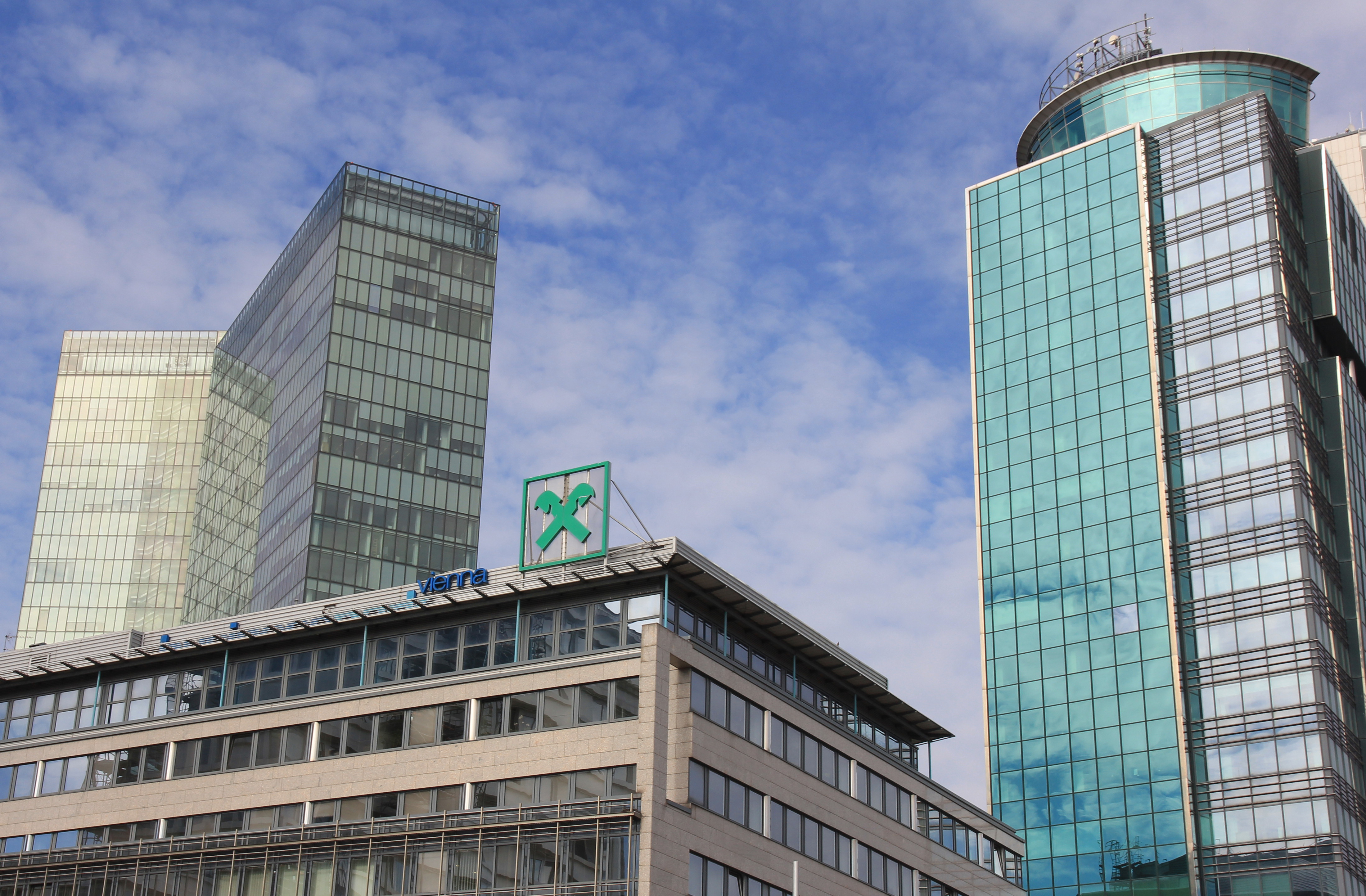 RWA Zentrale